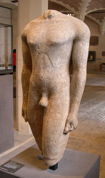 Tors de kouroi, procendent d’Actium. Cap el 570 aC